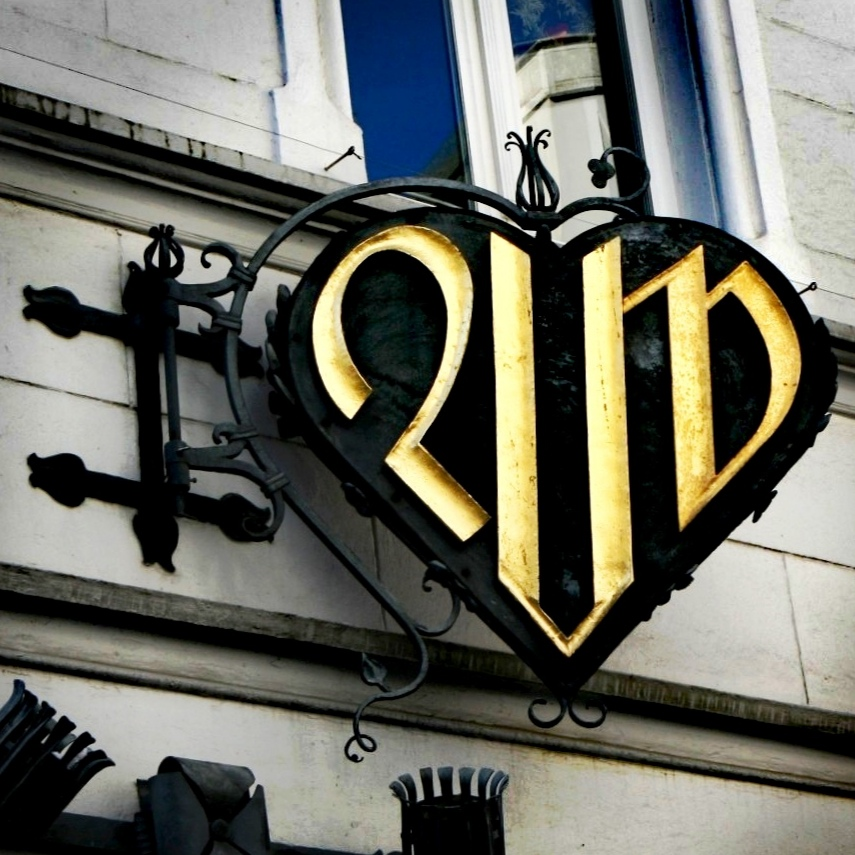 Schild am Gebäude der Arbeiterwohlfahrt in Lüdenscheid, Marienstraße 17.